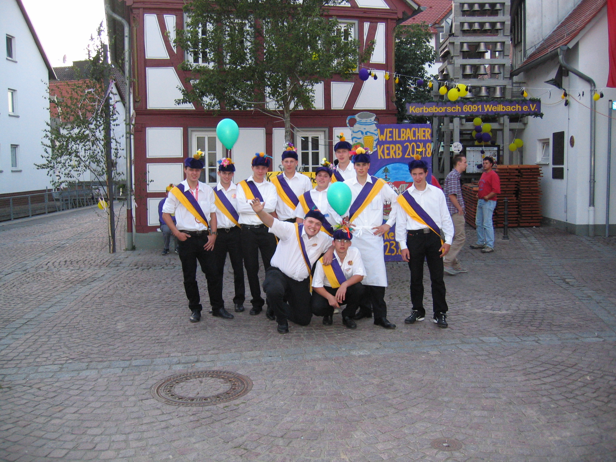 Kerbeborsch an der traditionellen Kerb (Kirchweih, Kirmes, Kerwe etc.) in Flörsheim-Weilbach bei Frankfurt.